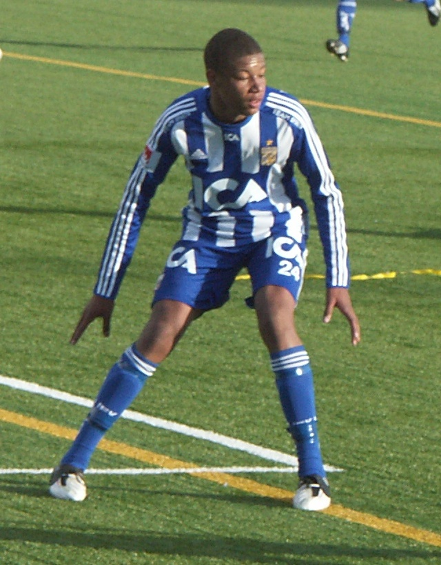 Mikael Dyrestam of IFK Göteborg in a friendly match against Lillestrøm at Backavallen in Göteborg March 28th, 2009.